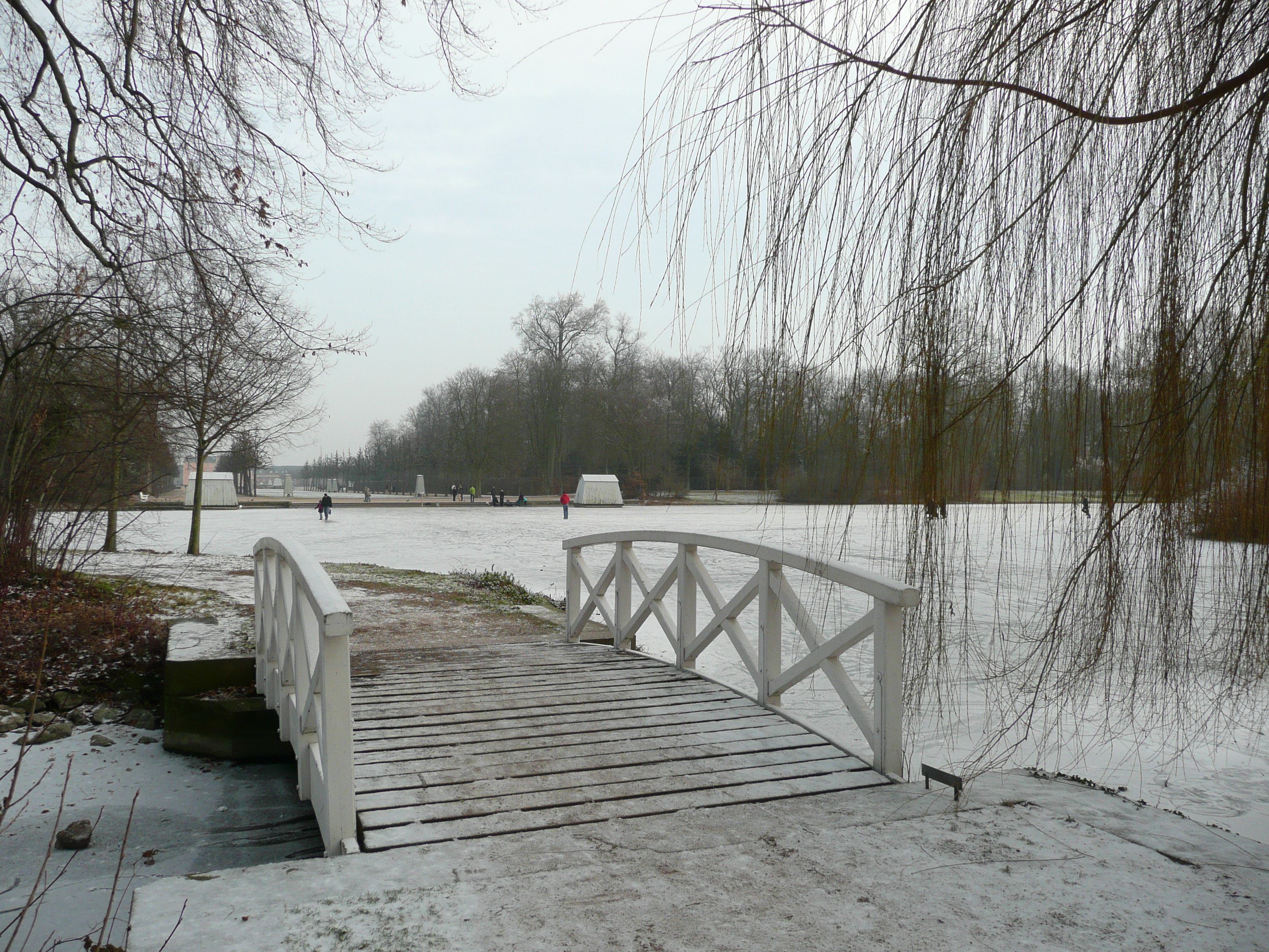 Schwetzingen, Garden and Bridge